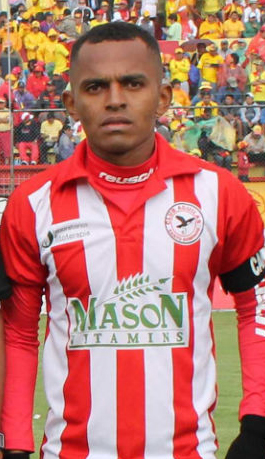 Jorge Chávez jugando para Águilas en el 2012